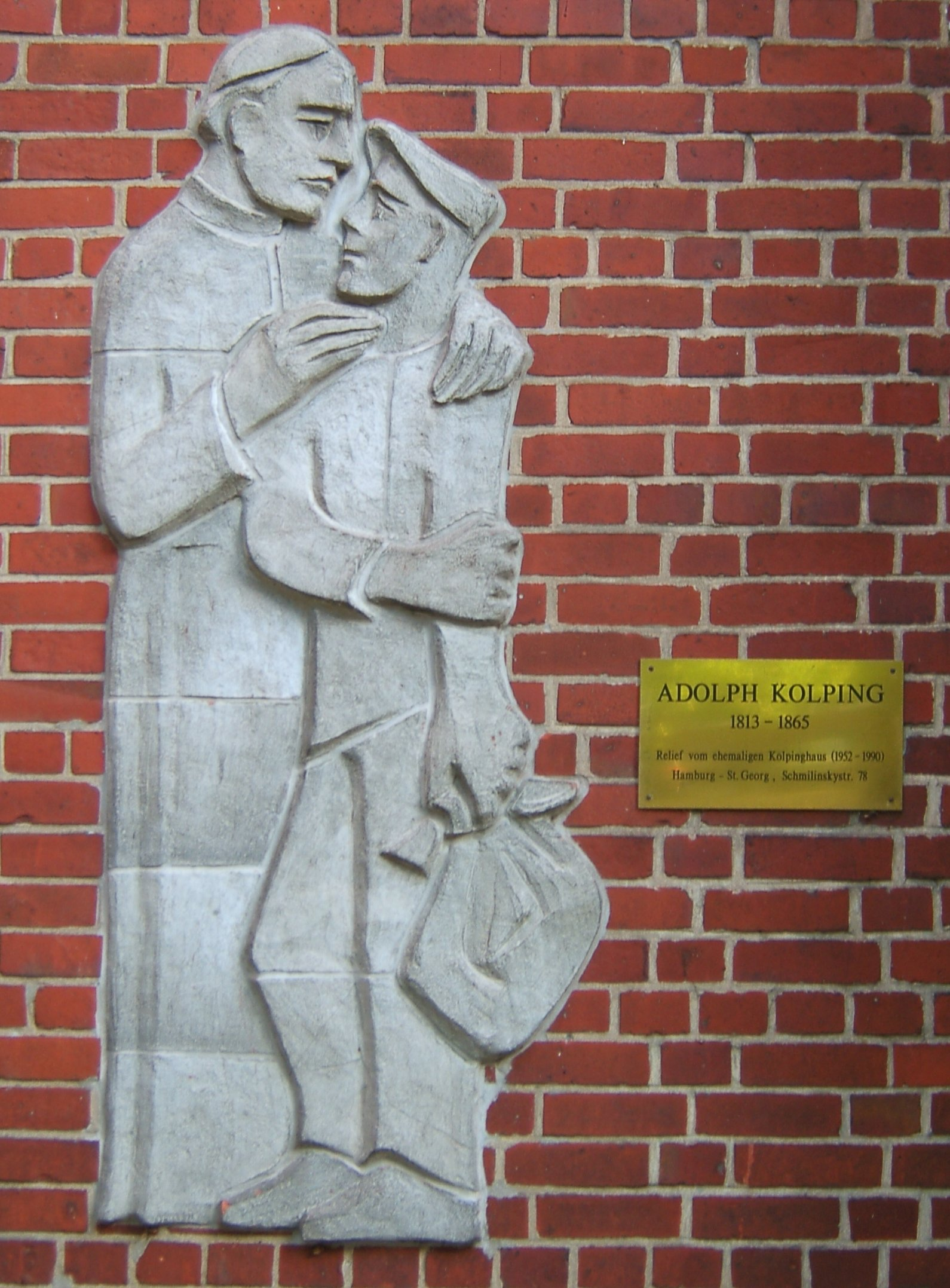 An der Domkirche St. Marien in Hamburg-St. Georg befindet sich dieses Relief mit dem Bildnis Adolph Kolpings. Es befand sich ursprünglich am Kolpinghaus in der Schmilinskystraße im selben Stadtteil.